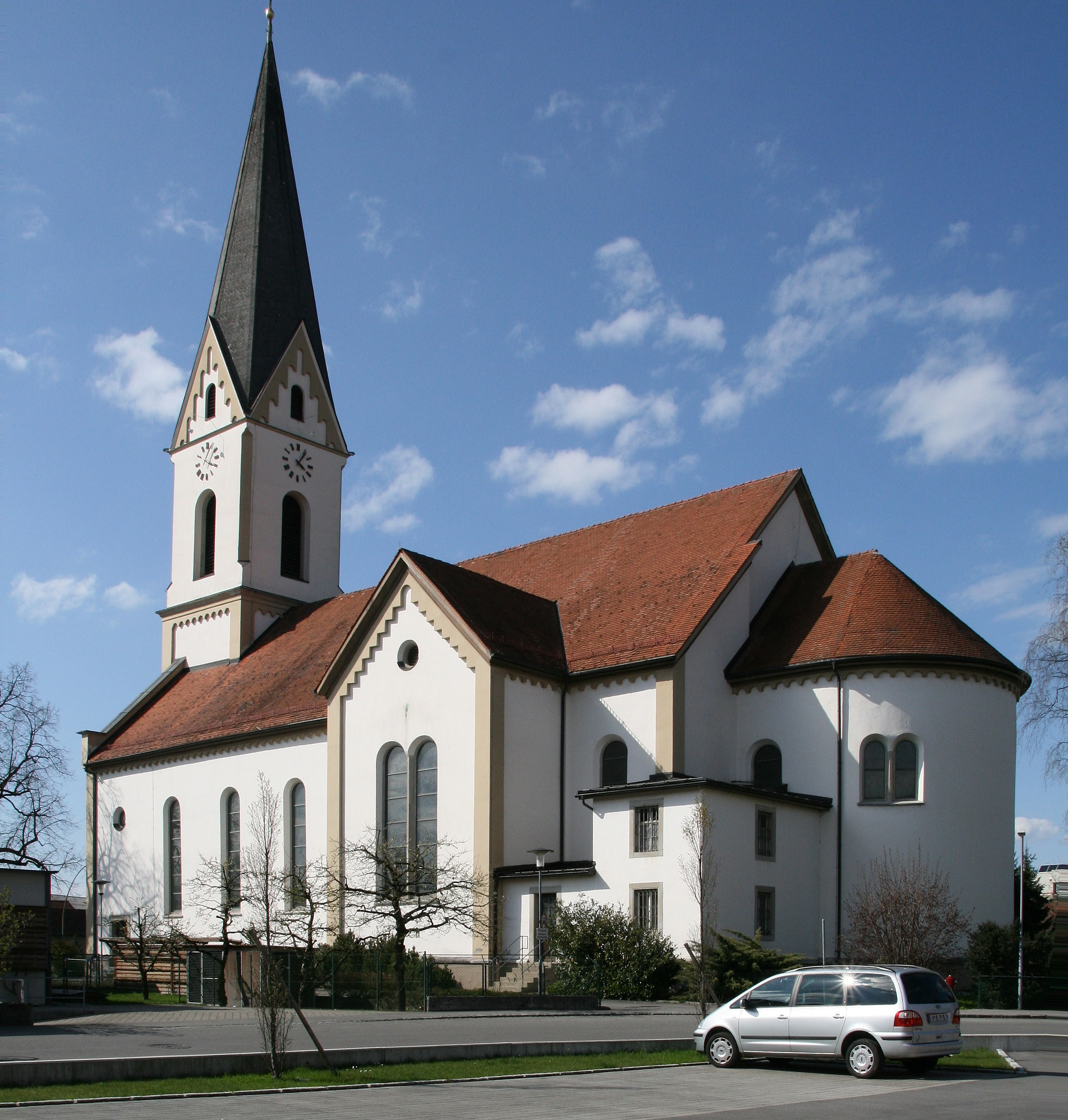 Pfarrkirche hl. Georg nach Plänen von Josef Anton Albrich und Alois Hagen erbaut 1878/79, in Lauterach (Vorarlberg), Vorarlberg.